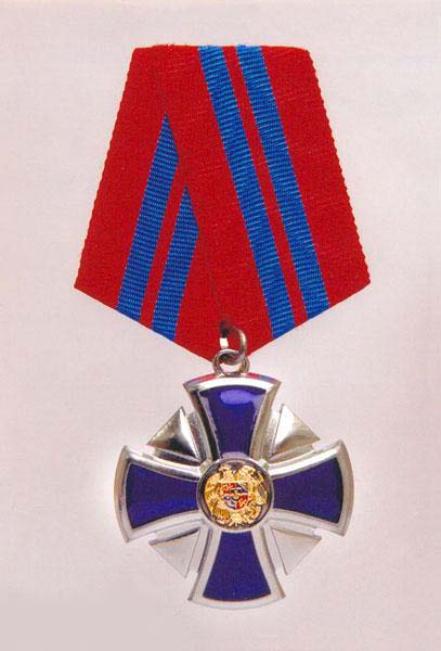 «Հայրենիքին մատուցած ծառայությունների համար» 2-րդ աստիճանի մեդալ։